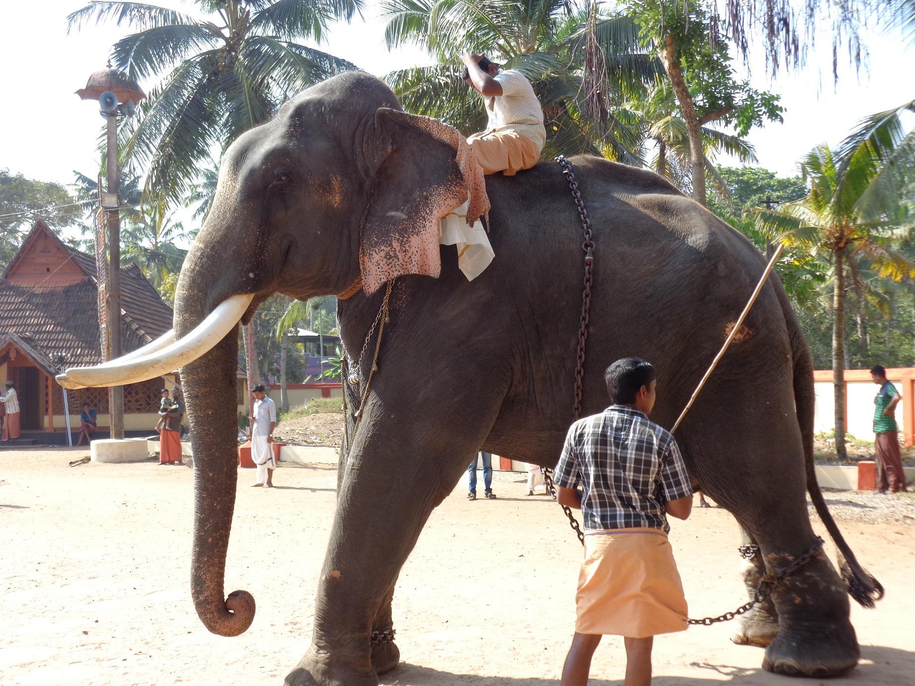 trikkadavoor sivaraju temple elephant